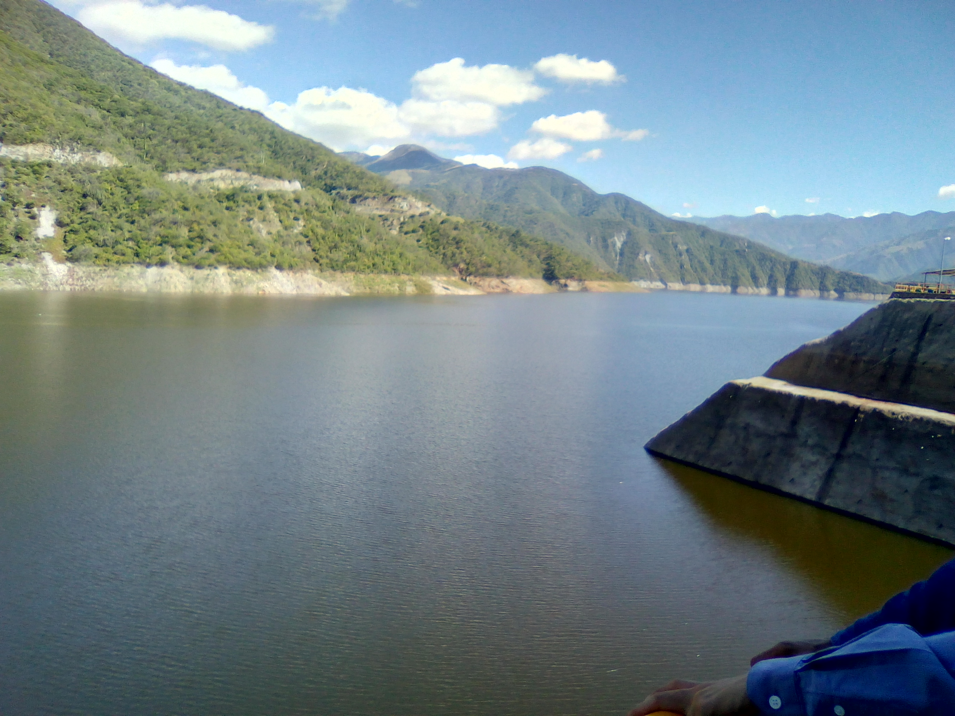 Presa La Yesca